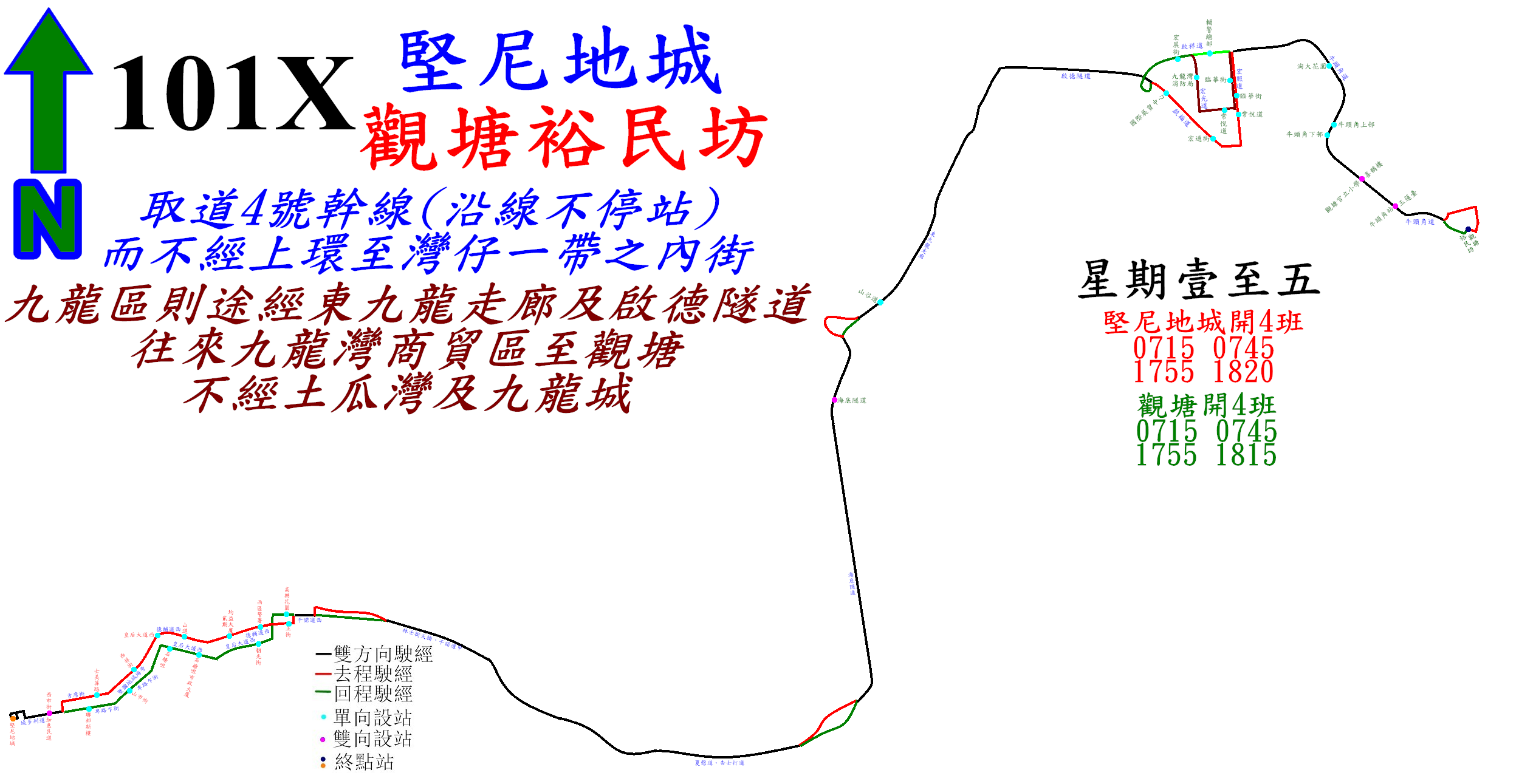 中文（香港）: 過海隧巴101X線的走線圖